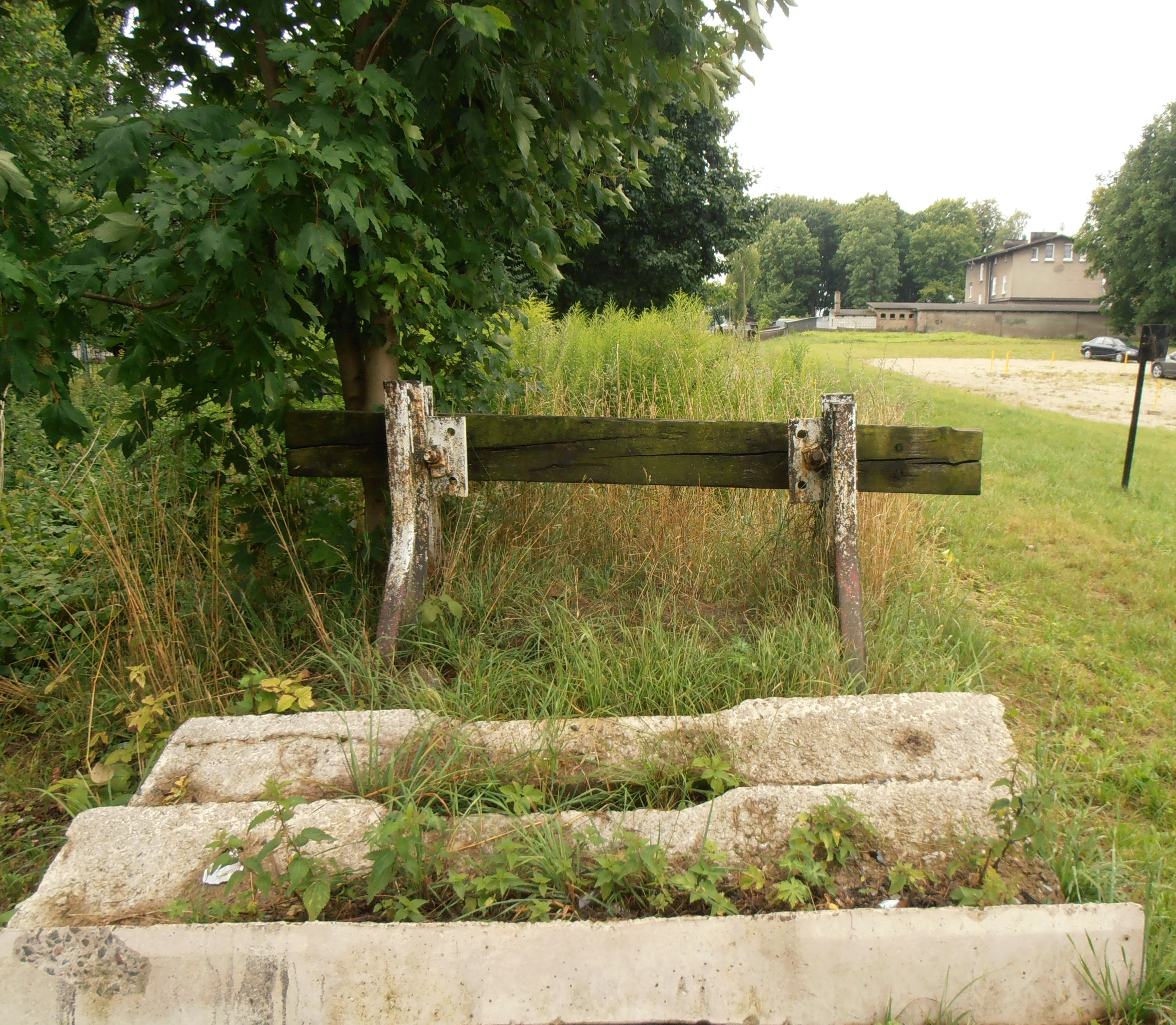 Lubawa (woj. warmińsko-mazurskie). Zakończenie linii kolejowej nr 252 tuż za stacją kolejową.